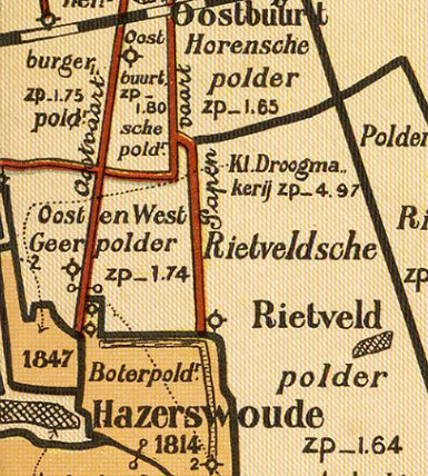 Oost_en_West_Geerpolder